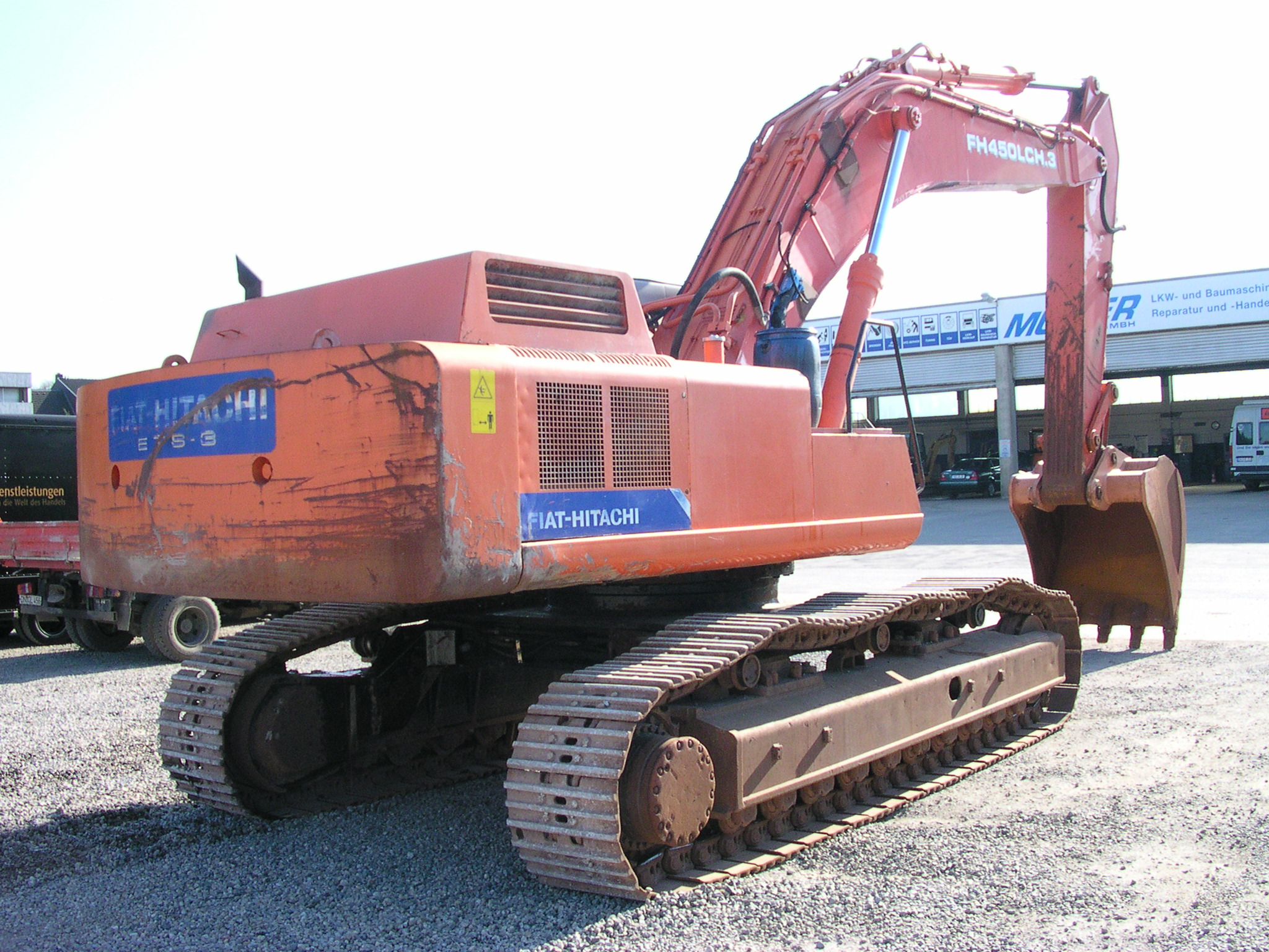 Hitachi FH 450 LCH3 Kettenbagger (FH steht für „Fiat Hitachi“), 44,7 to. Gesamtgewicht, Baujahr 1998